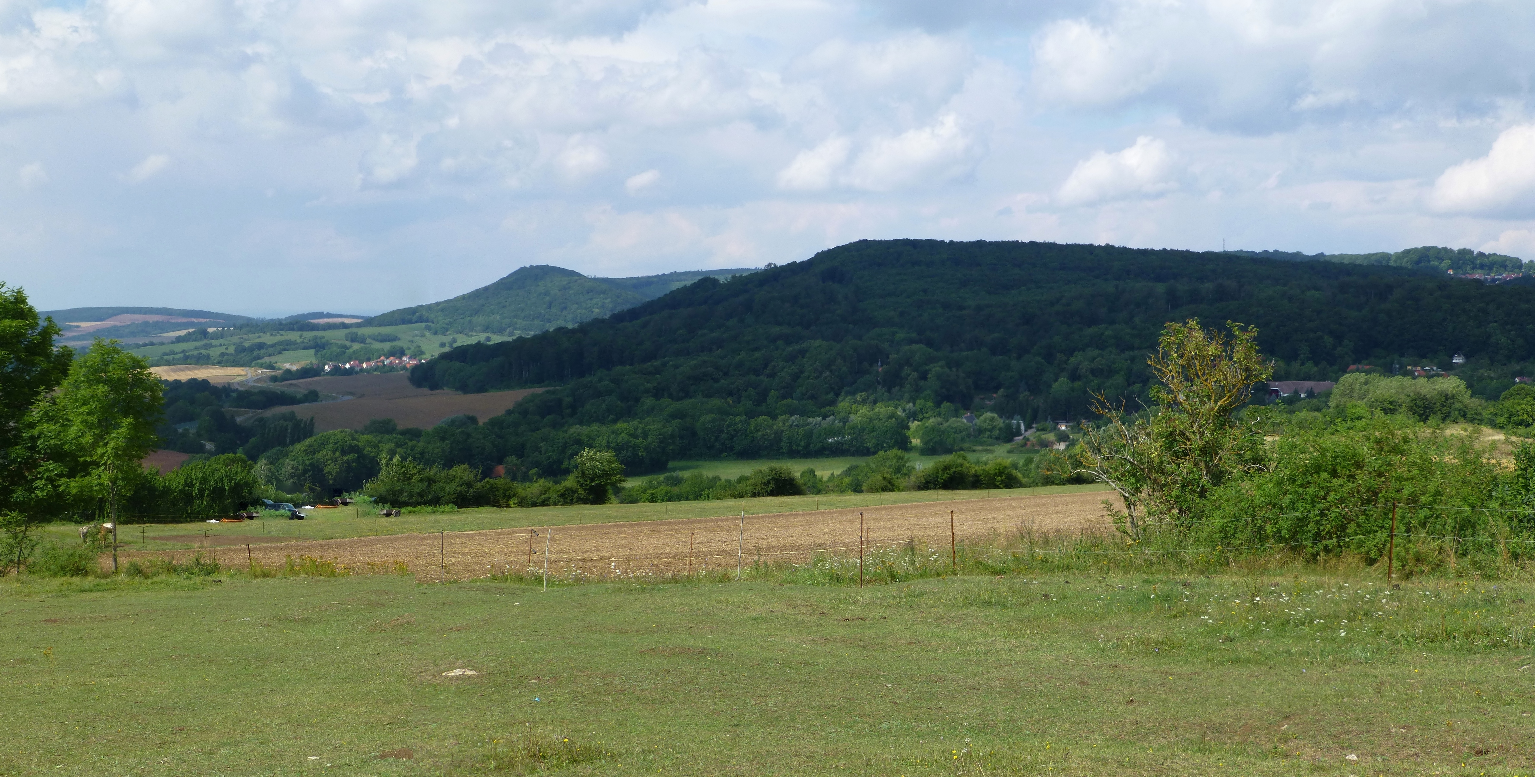 Blick vom Klien zum Kanstein bei Worbis (im Hintergrund links der Fernstein)